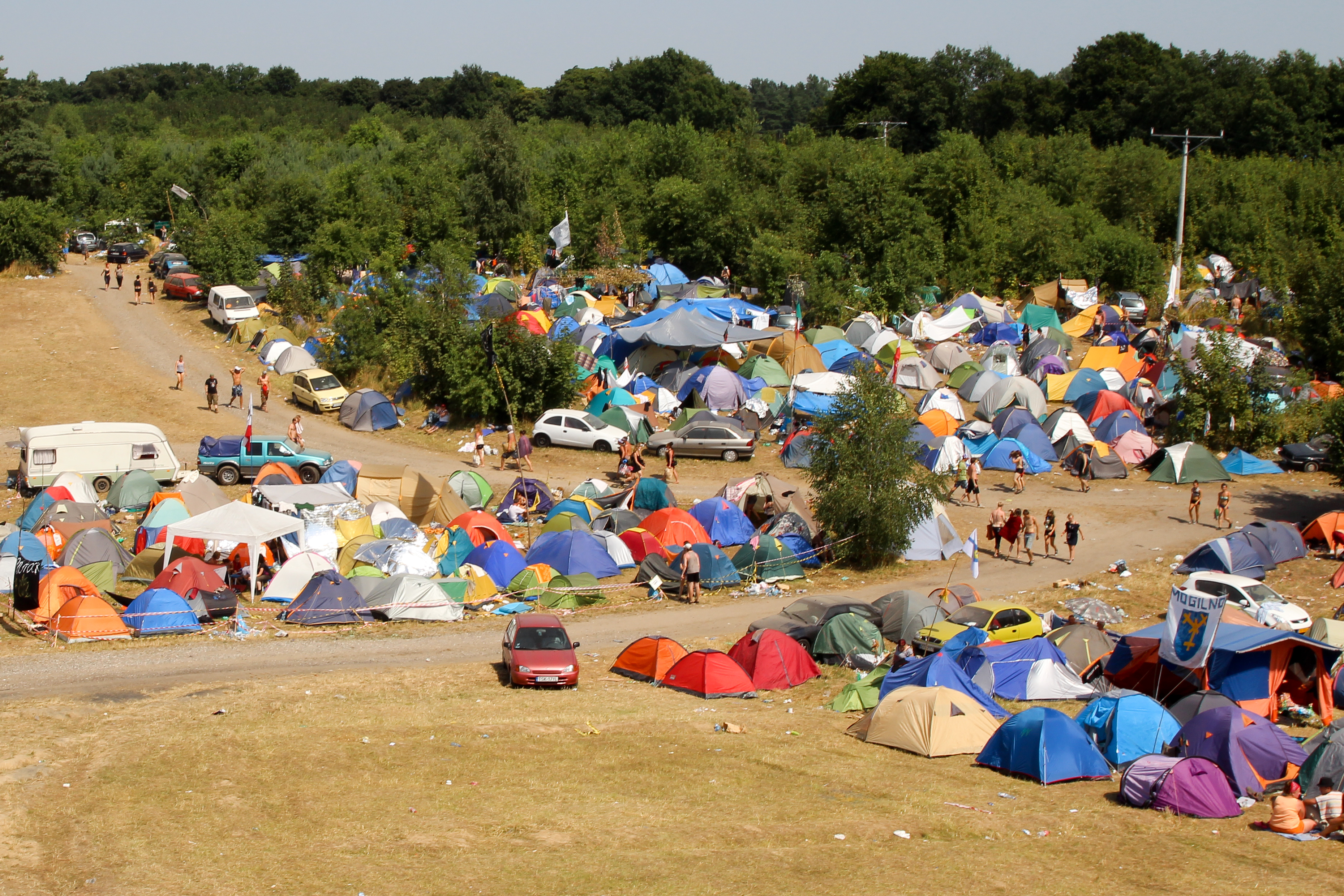 Przystanek Woodstock w 2013 r.